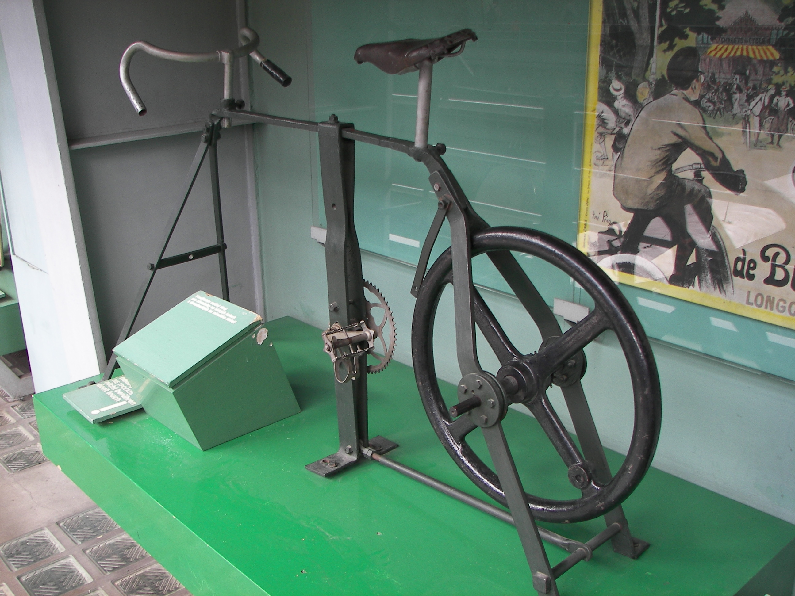 Bicycle trainer construed by Voldřich sometimes 1890-1899, photo from Národní techncké muzeum Praha